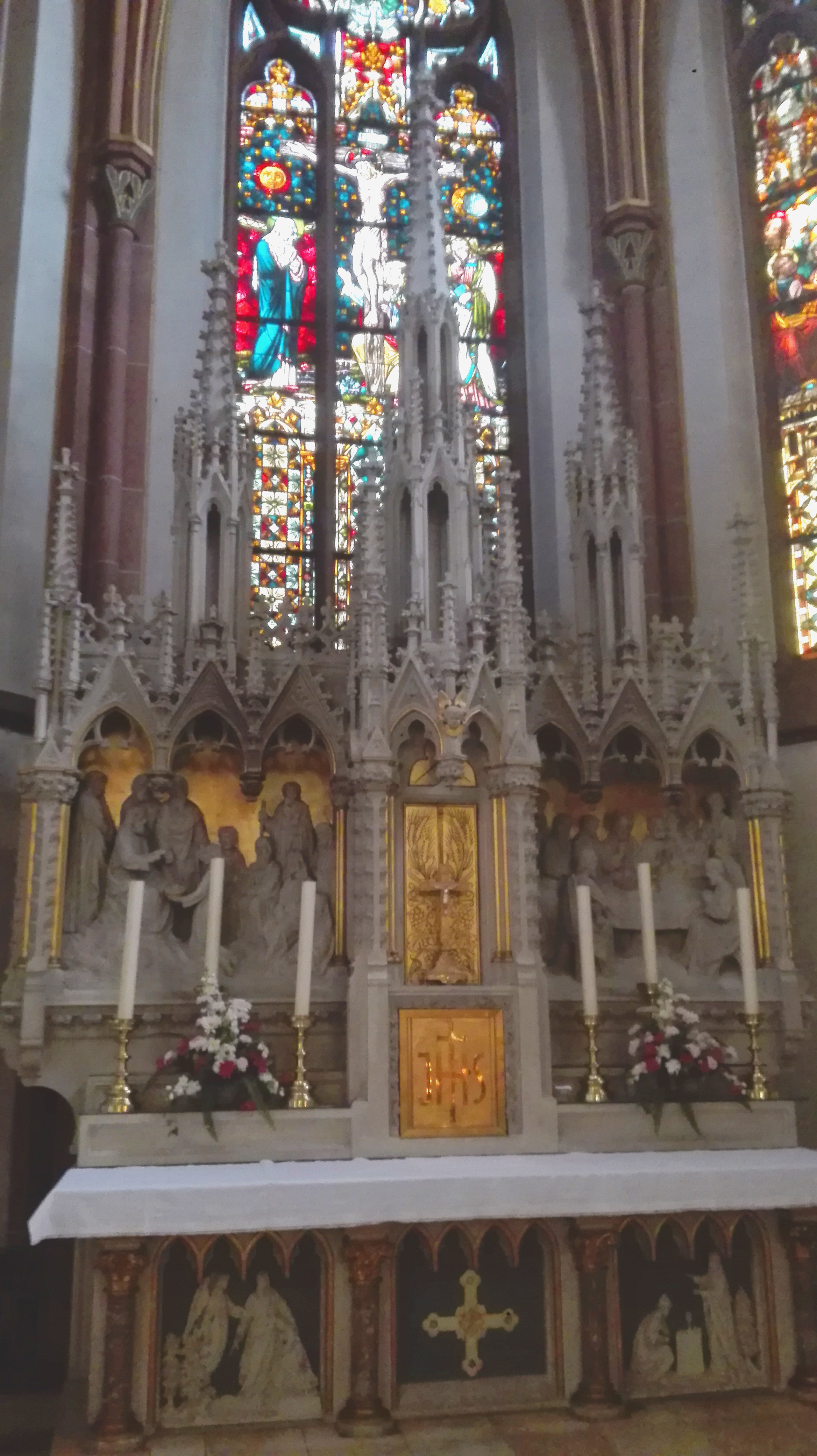 Neugotischer Hochaltar der Pfarrkirche St. Pankratius in Offenbach-Bürgel